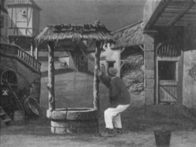 photo du film "Le puits fantastique" (Méliès, 1903)